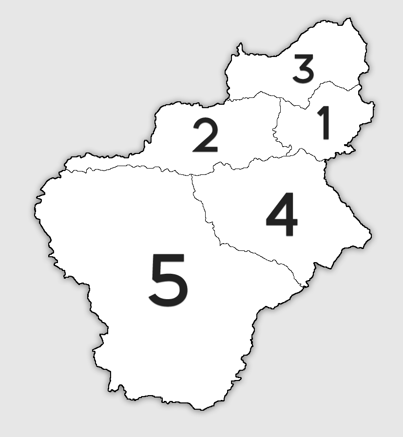 Divisiones administrativas del cantón de Acosta, Costa Rica.